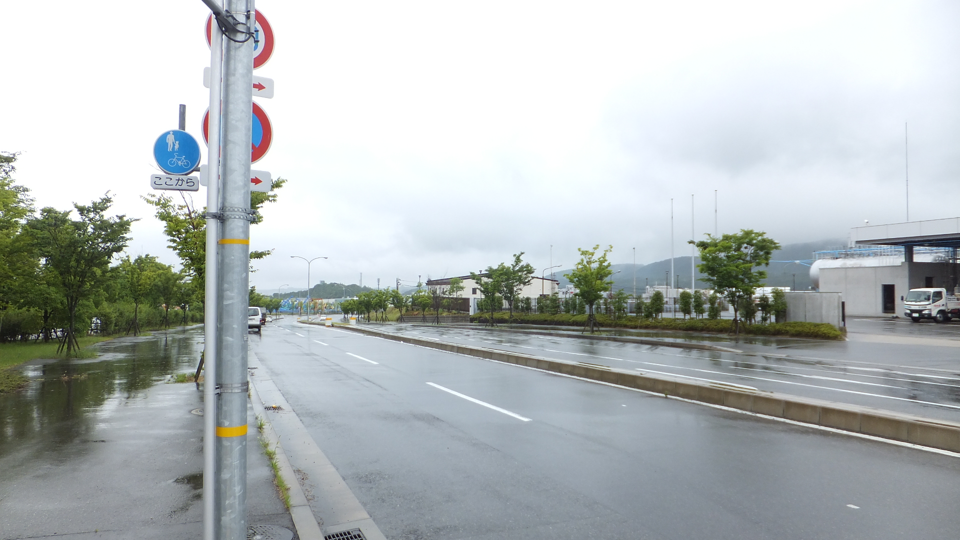 兵庫県神戸市西区見津が丘3丁目